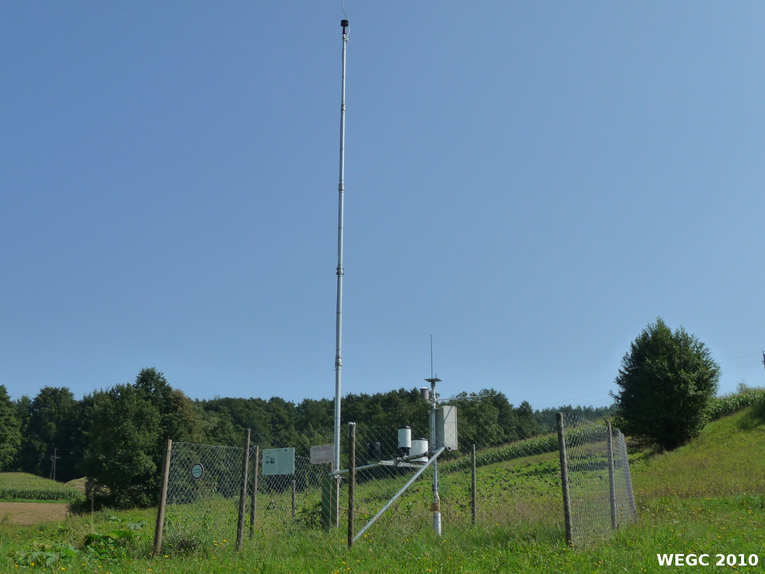 Referenzstation in Mühldorf 2010